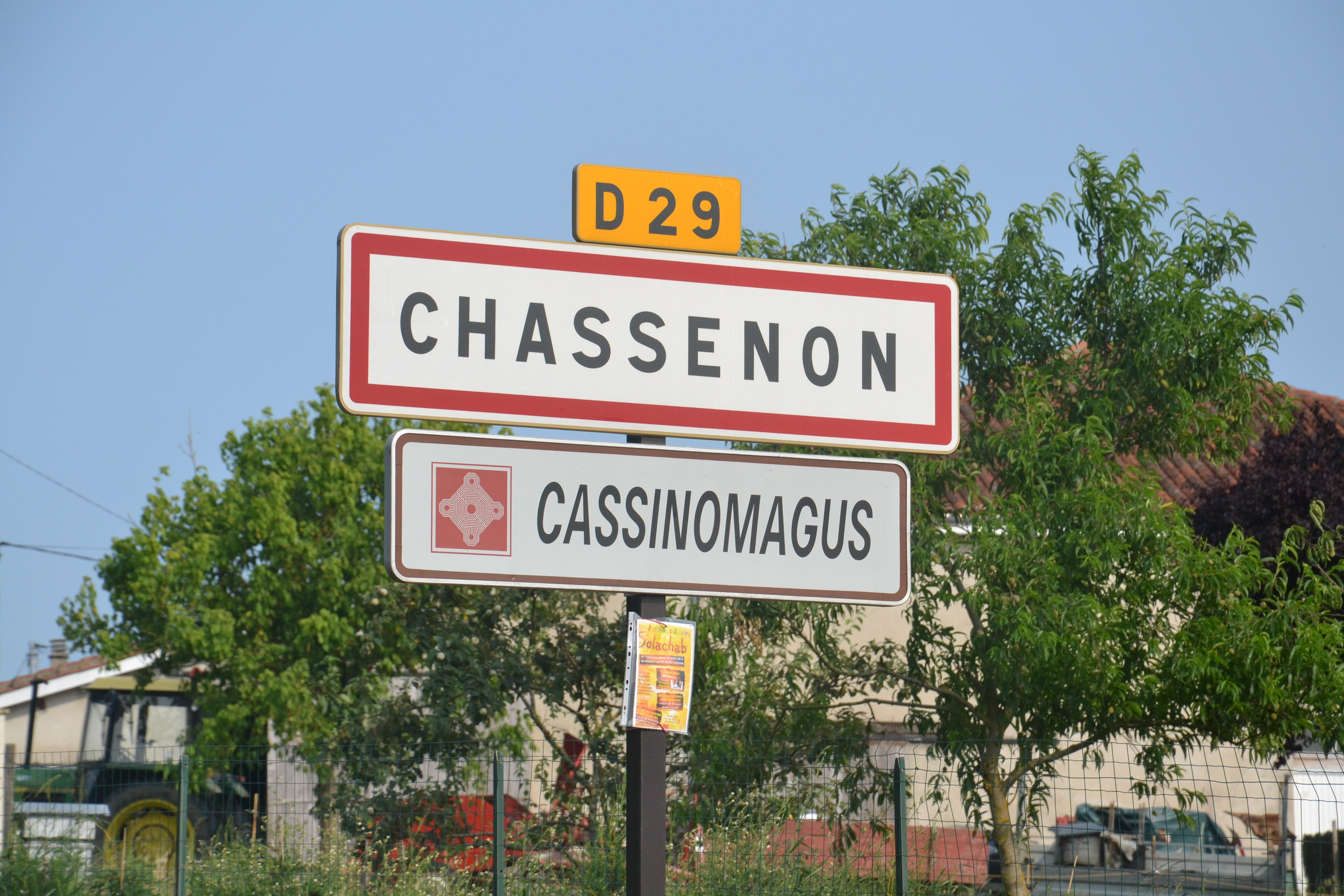 Panneau bilingue français/latin de Chassenon/Cassinomagus (Charente, France)